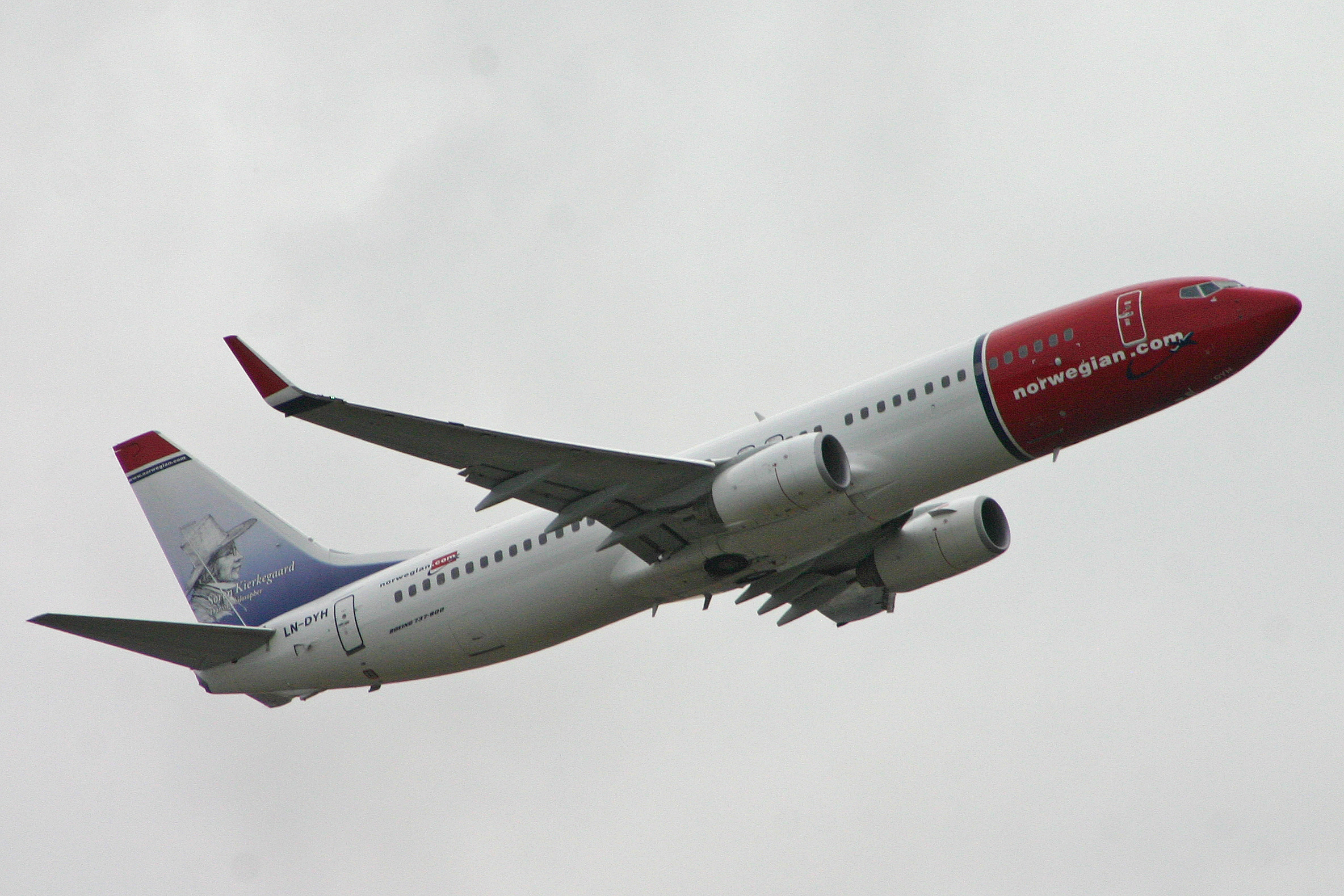 msn 40865, l/n 3410. Rome Fiumicino 21-10-2011